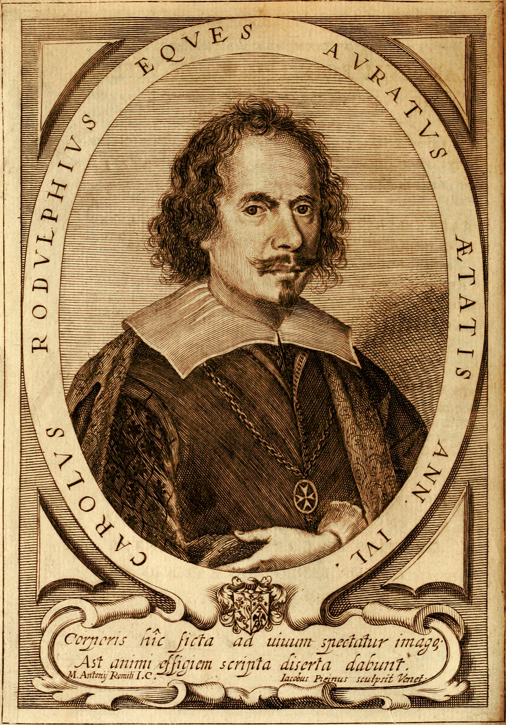 Ritratto di Carlo Ridolfi